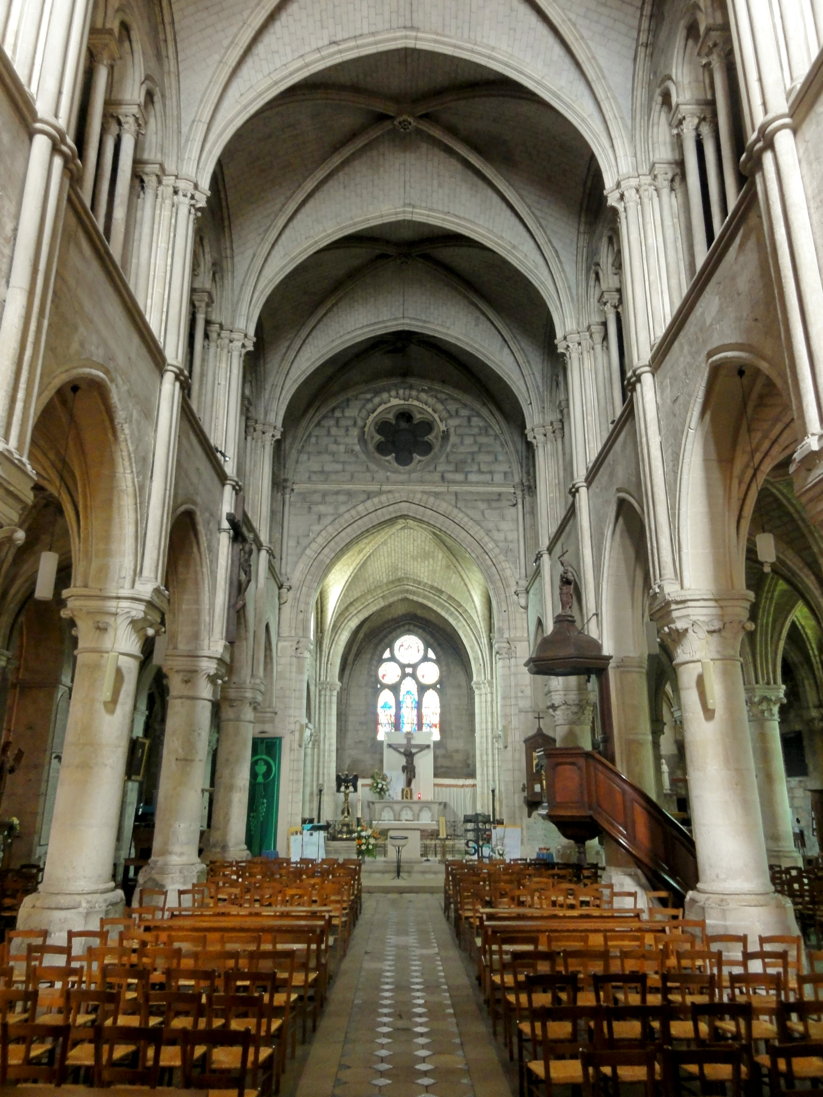 Nef, vue générale depuis l'ouest.